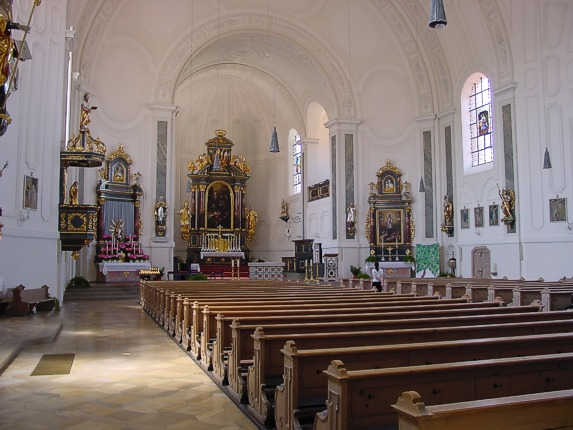 Stadtpfarrkirche St. Walburga Beilngries, Innenraum